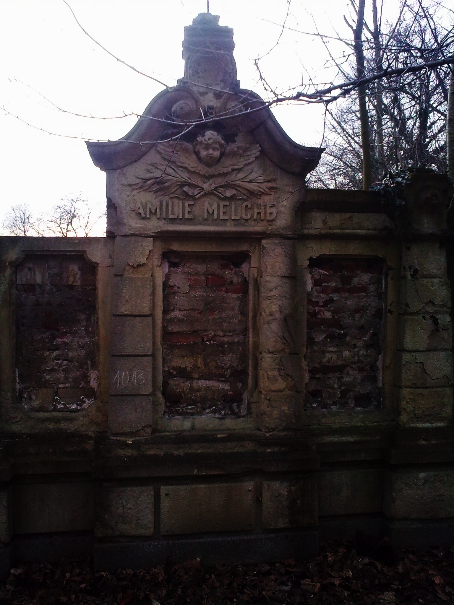 Grobowiec na cmentarzu, przy ul. Wrocławskiej w Opolu